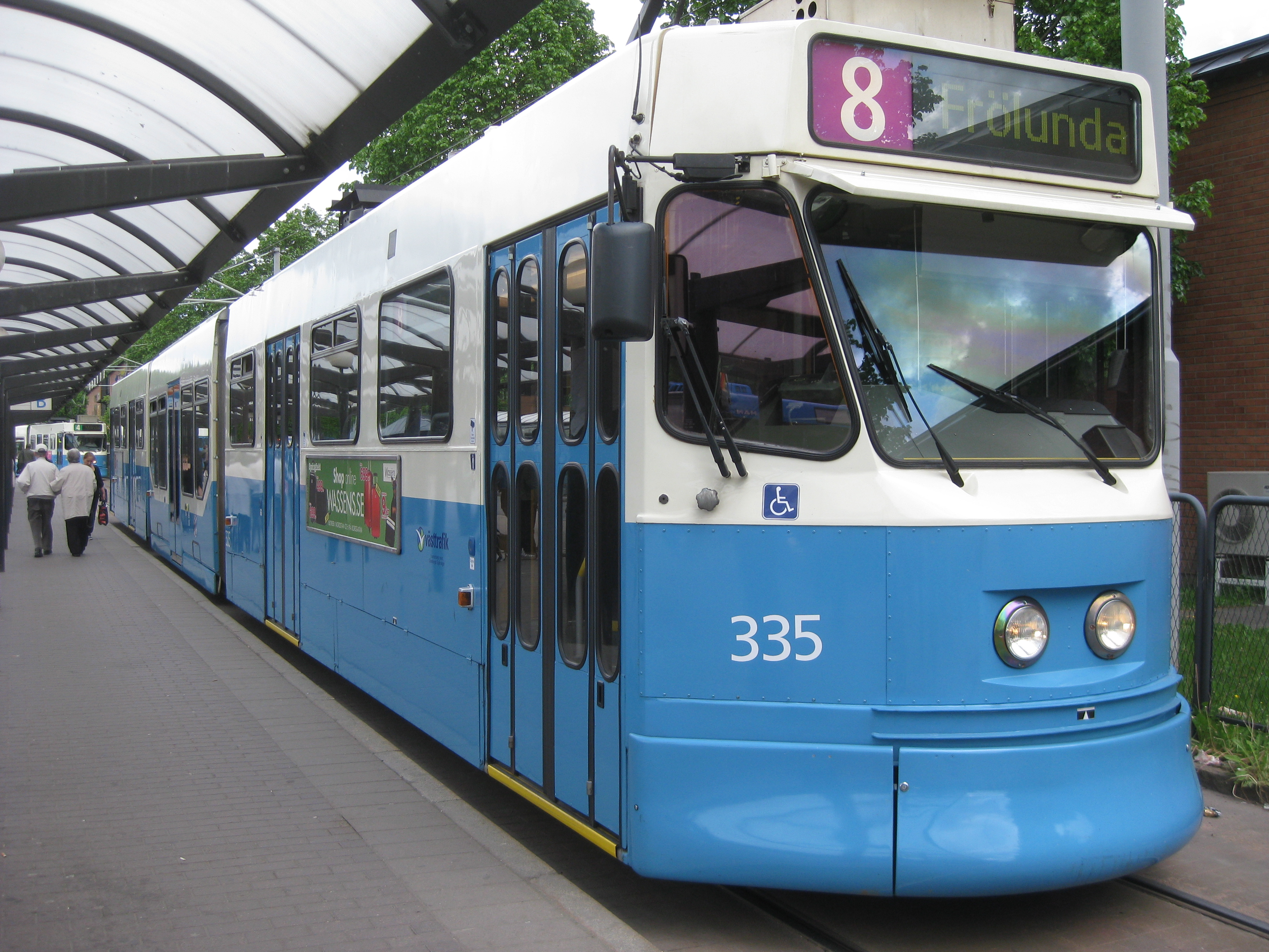 Spårvagn av typen M31 med nummer 335 vid Angered Centrum.